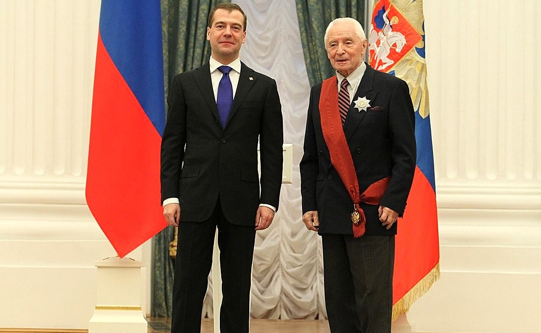 Дмитрий Медведев на церемонии вручения государственных наград. Орденом «За заслуги перед Отечеством» I степени награждён балетмейстер Государственного Большого театра России Юрий Григорович